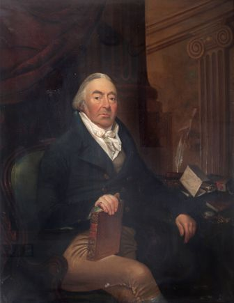 Portrait de John Grosvenor par T. Leeming